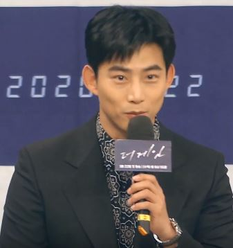 1월 22일 오후 서울시 마포구 상암동 MBC 에서 새 수목드라마 '더 게임: 0시를 향하여' 제작발표회가 열려 배우 옥택연, 이연희, 임주환, 장준호 PD가 참석해 작품에 대한 소개와 배역을 설명하고 있다.